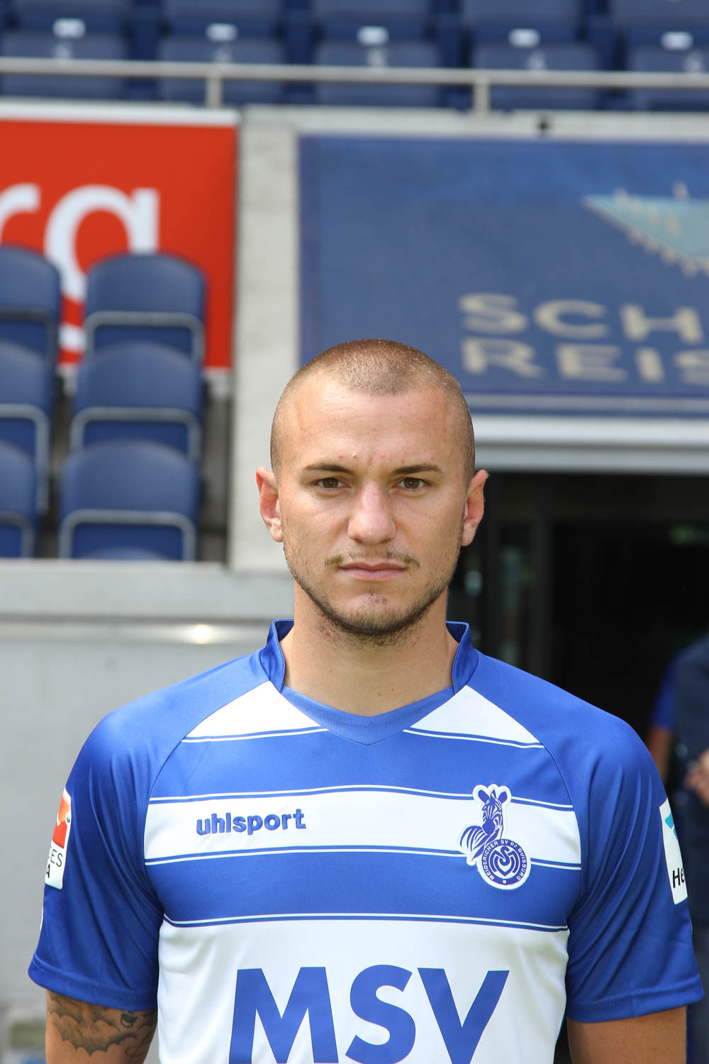 Simon Brandstetter 2015